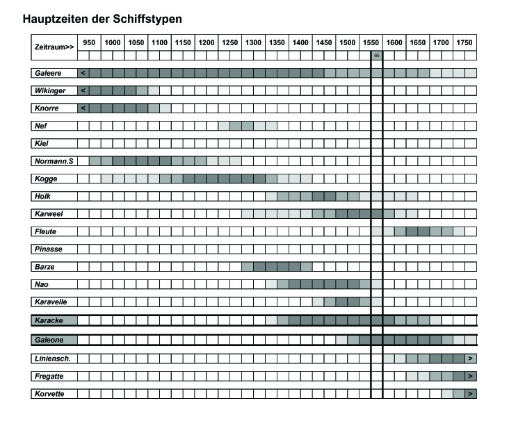 Zeitliche Einordnung des Flaggschiff der Hanse Adler von Lübeck (1567-88) nach ihrem Schiffstyp. Die Tabelle zeigt die Evolution des europäischen Schiffbaus und die Blütezeit der einzelnen Schiffstypen (abgestuft in Grautönen). Anhand überlappender Hauptzeiten läßt sich häufig, wenn auch nicht immer, auf gegenseitige Beeinflußung der Bauweise schließen. Die fett markierte vertikale Spalte markiert die ungefähre Dienstzeit der Adler von Lübeck (Kiellegung 1565), die sowohl Elemente einer Karacke als auch einer Galeone in sich vereinigt.